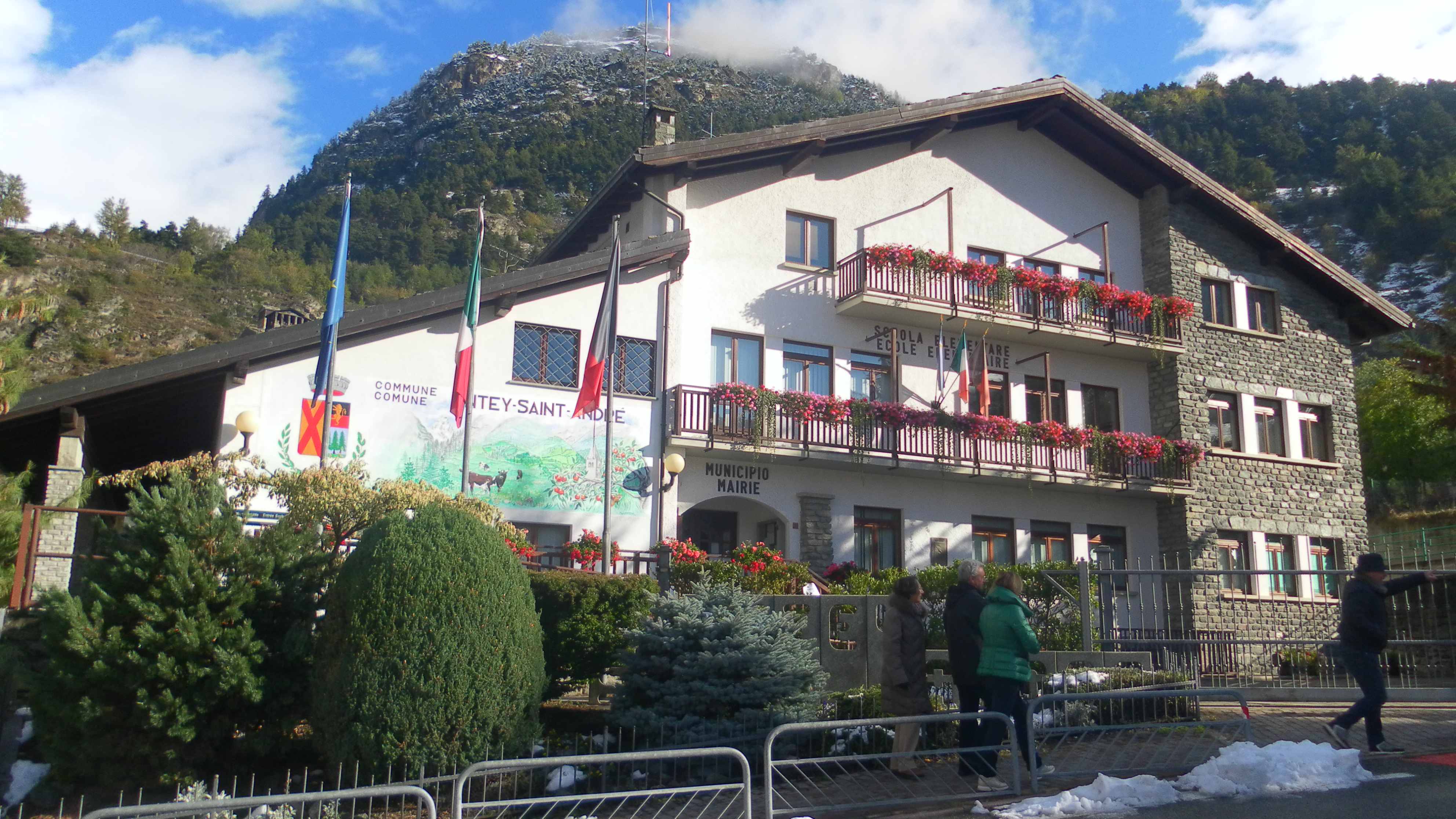 Mairie et école de Antey-St.-André (Italie)